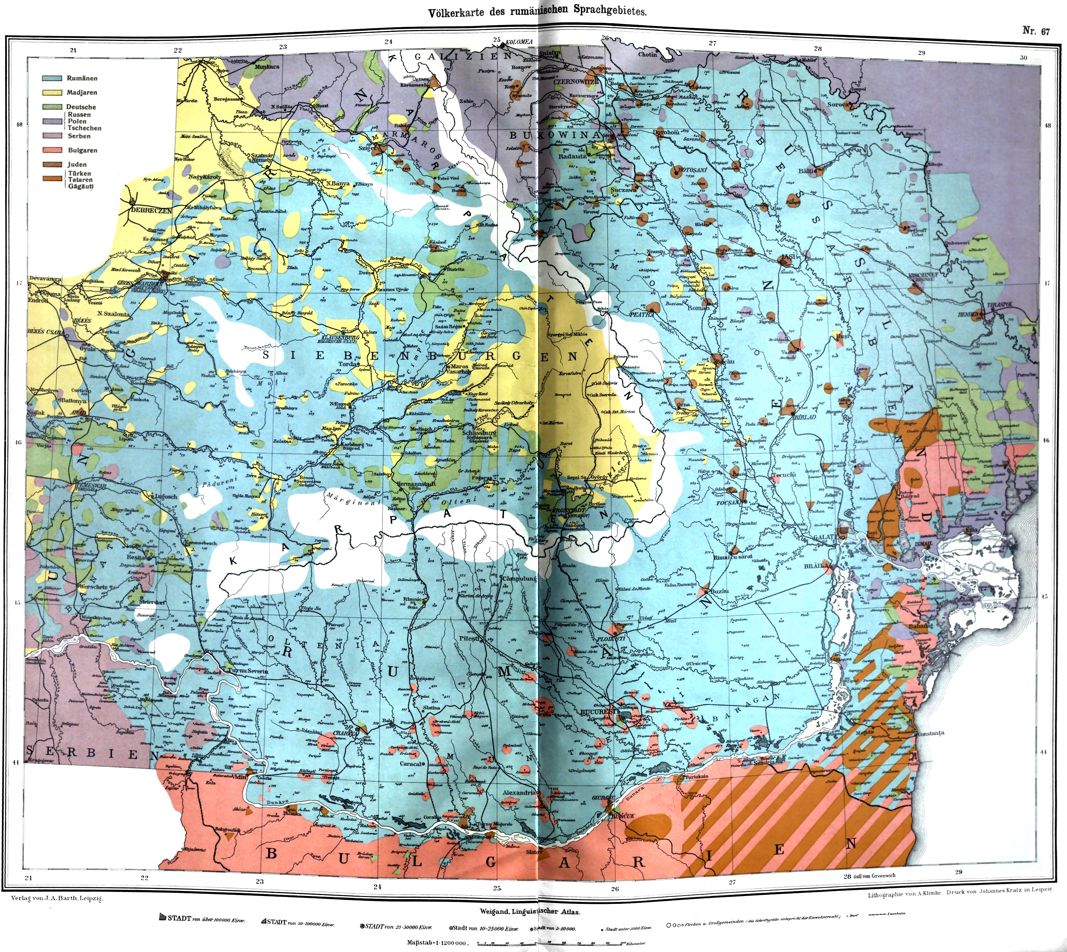 Harta etnică a arealului lingvistic românesc